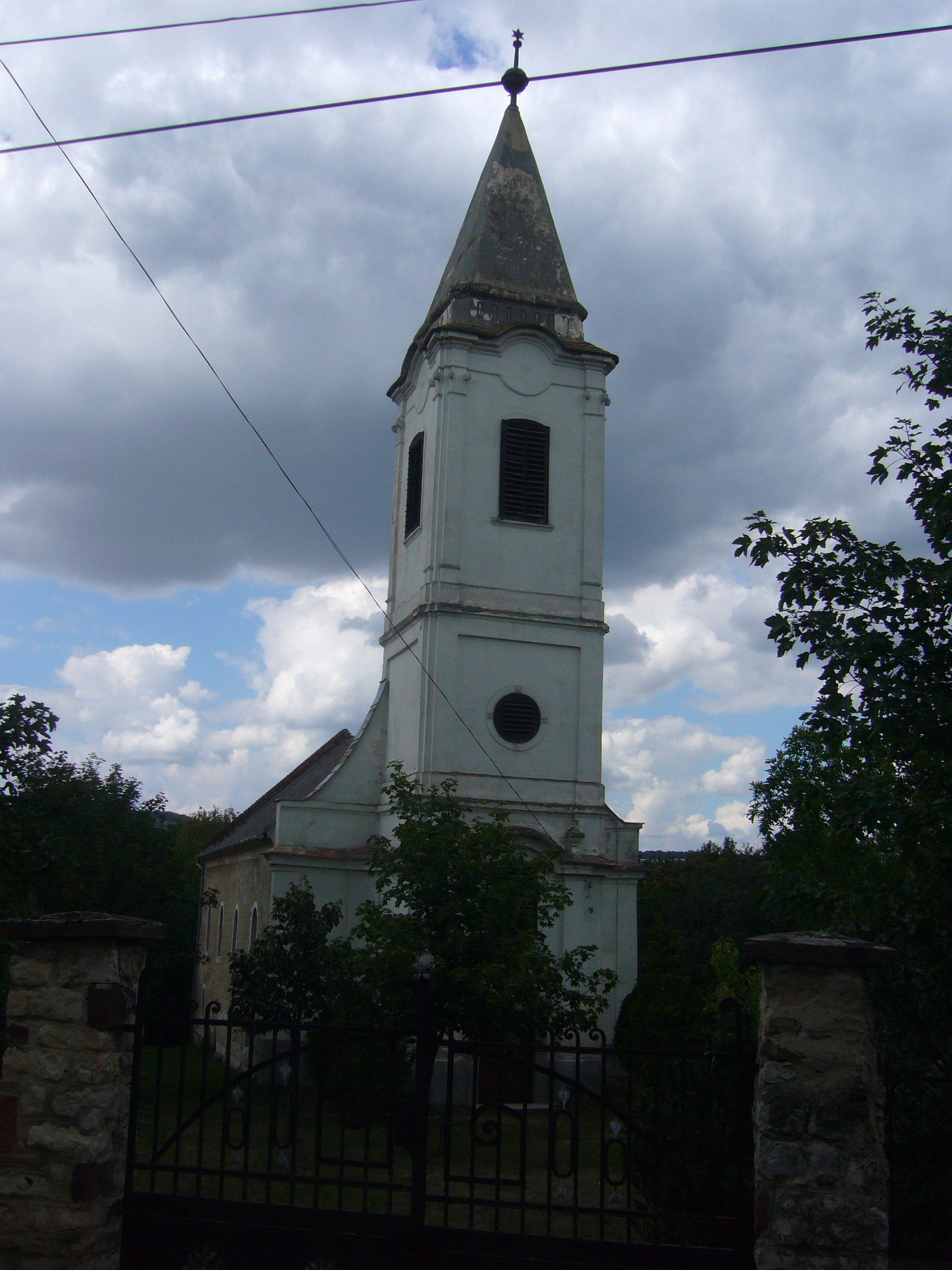 Szentantalfa temploma